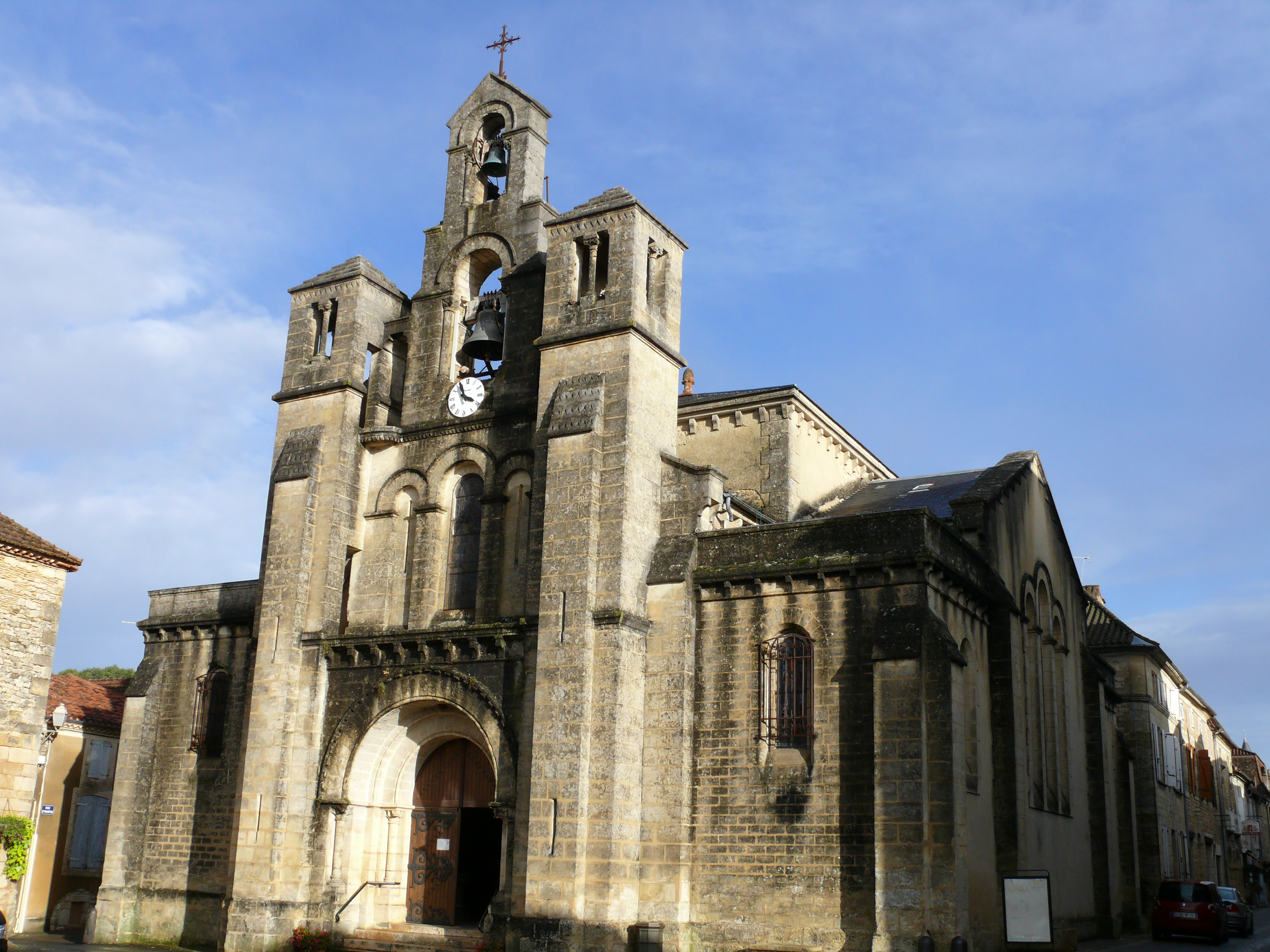 Villefranche-du-Périgord - Eglise Notre-Dame-de-l'Assomption - Façade